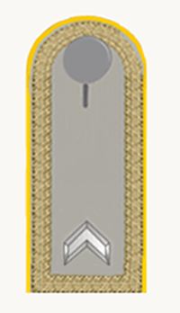 Ausgehanzug/Dienstanzug Feldwebel der Aufklärungstruppe